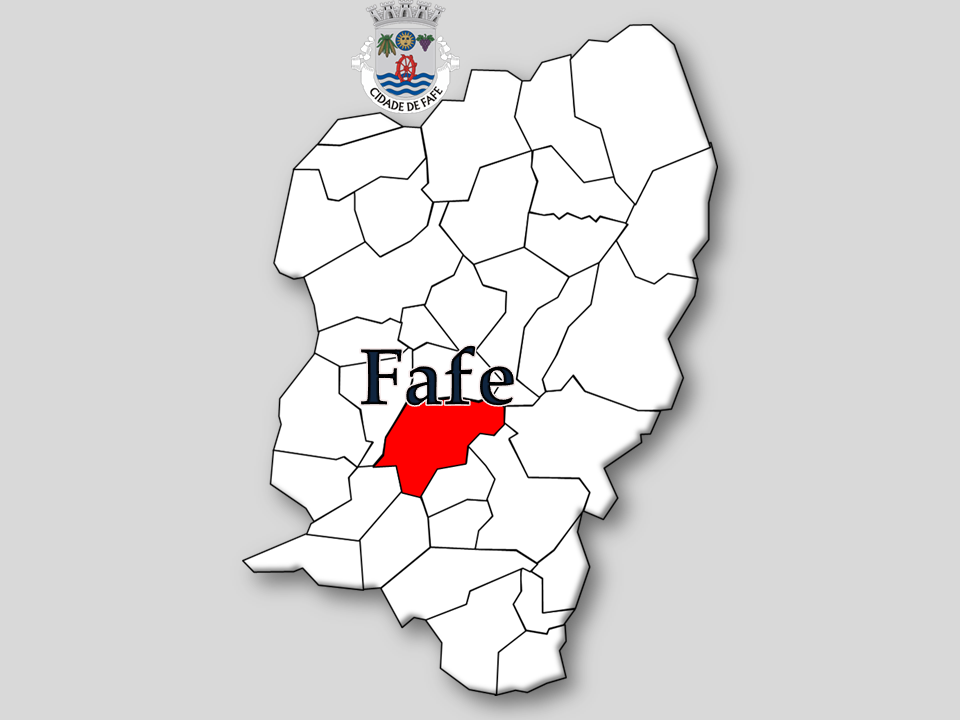 Censos 1864/2011